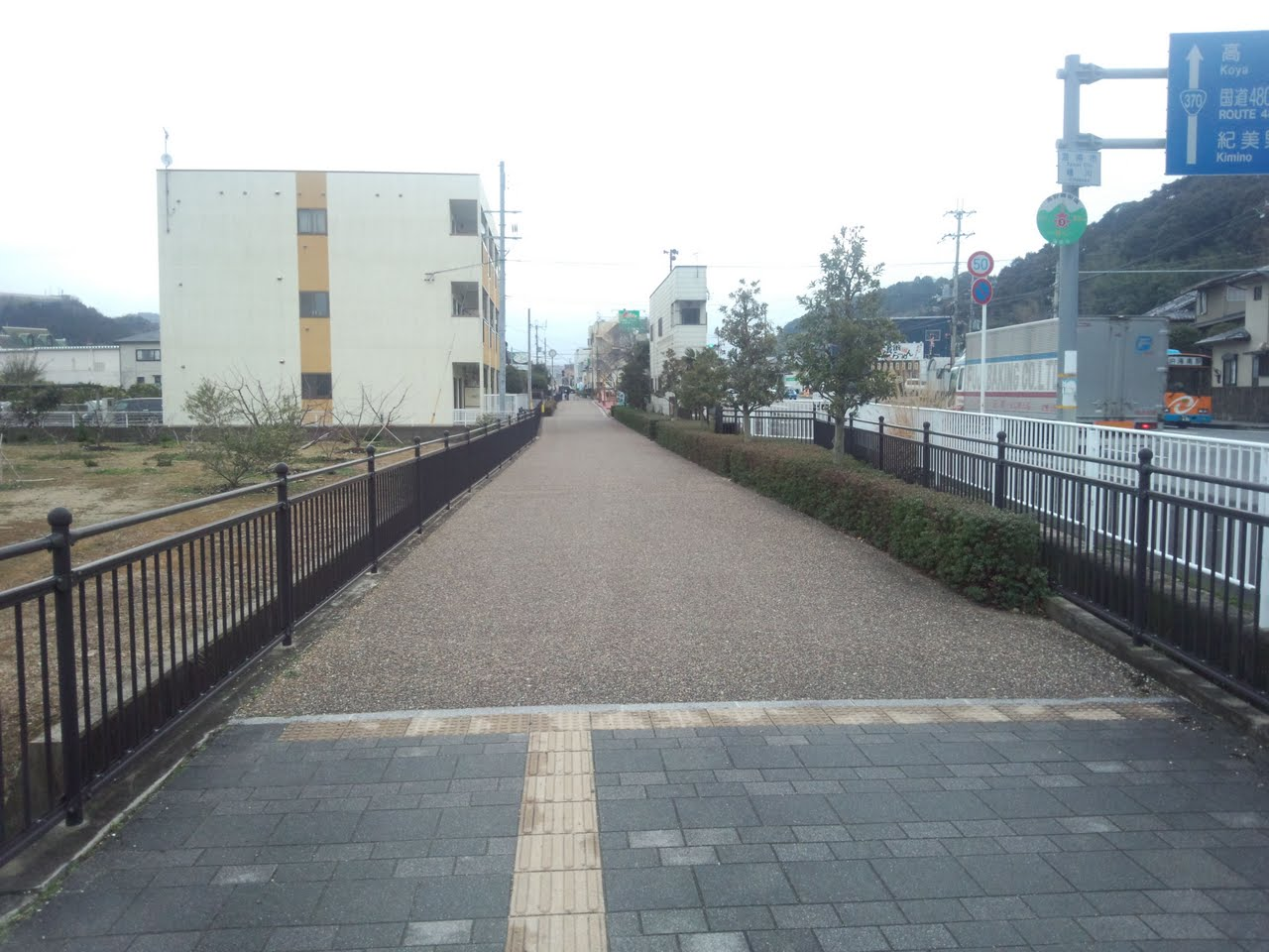 野上鉄道線の跡地。現在は、遊歩道として整備されている。